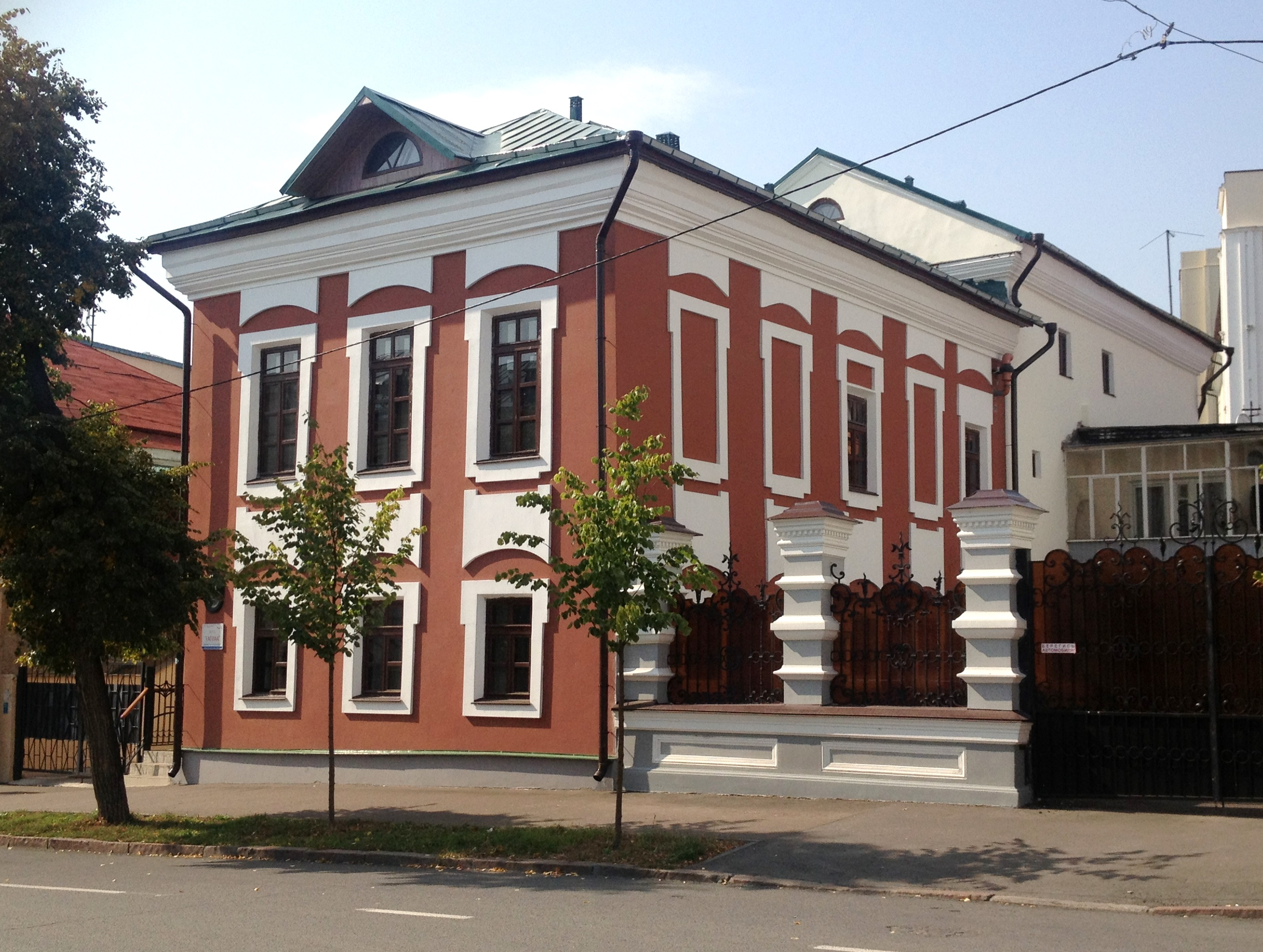 Дом жилой: улица Миславского, 11, Казань, Татарстан